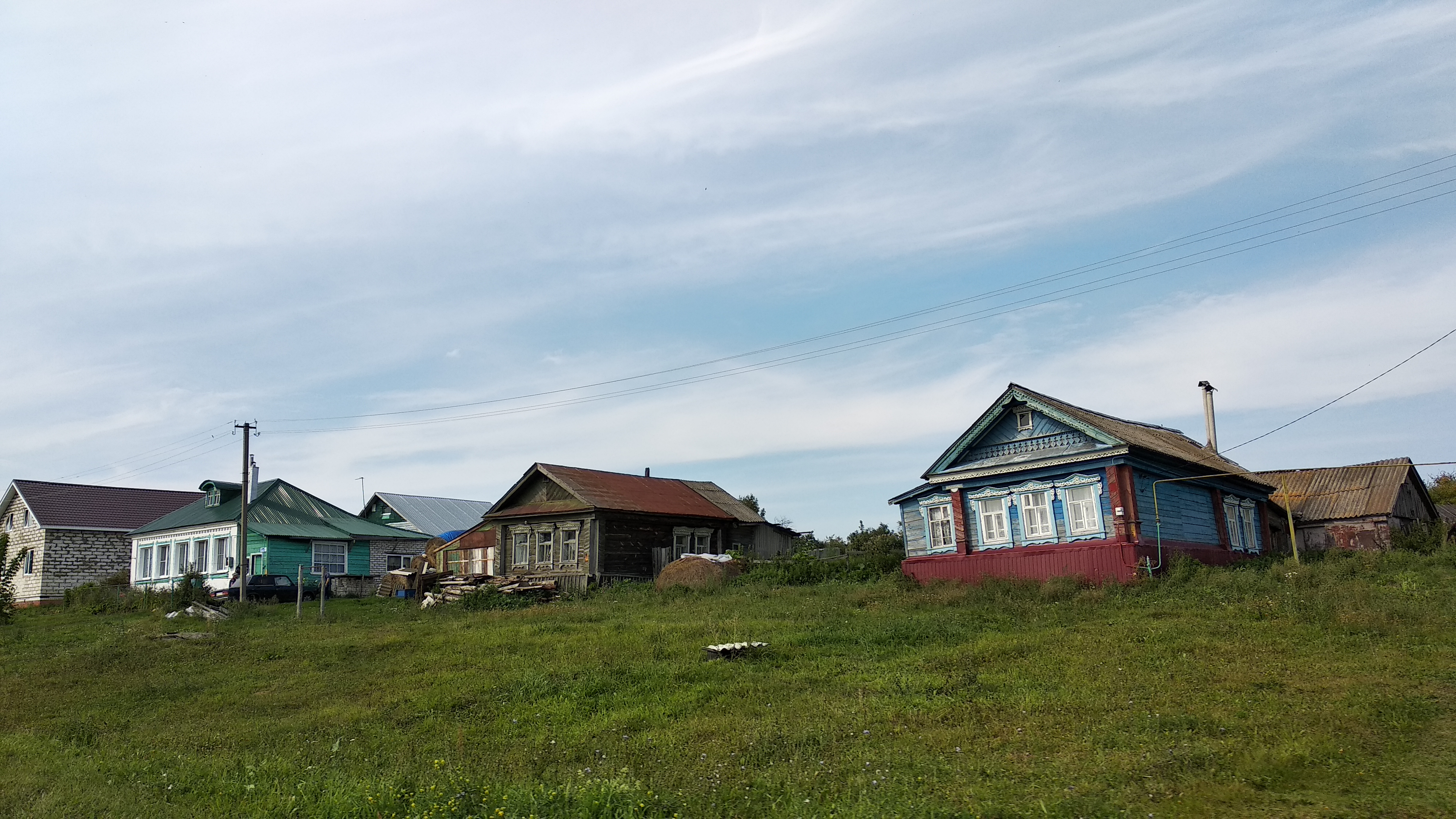 село Тольский майдан